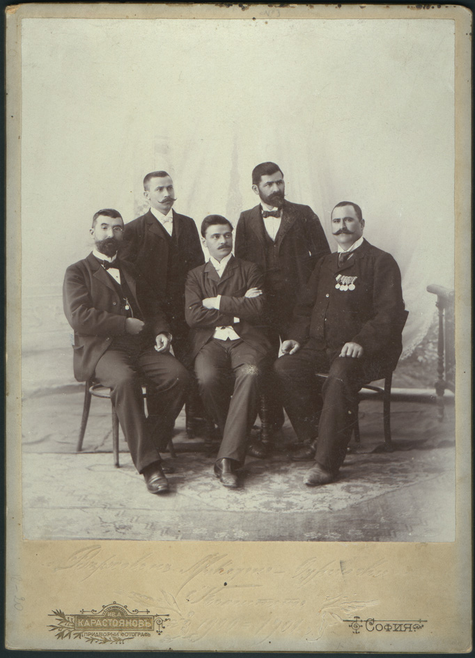 Върховният комитет около 1899 - 1900. Седнали Тома Давидов (подпредседател), Борис Сарафов (председател), Георги Петров (касиер). Прави Владислав Ковачев (член), Георги Минков (член).